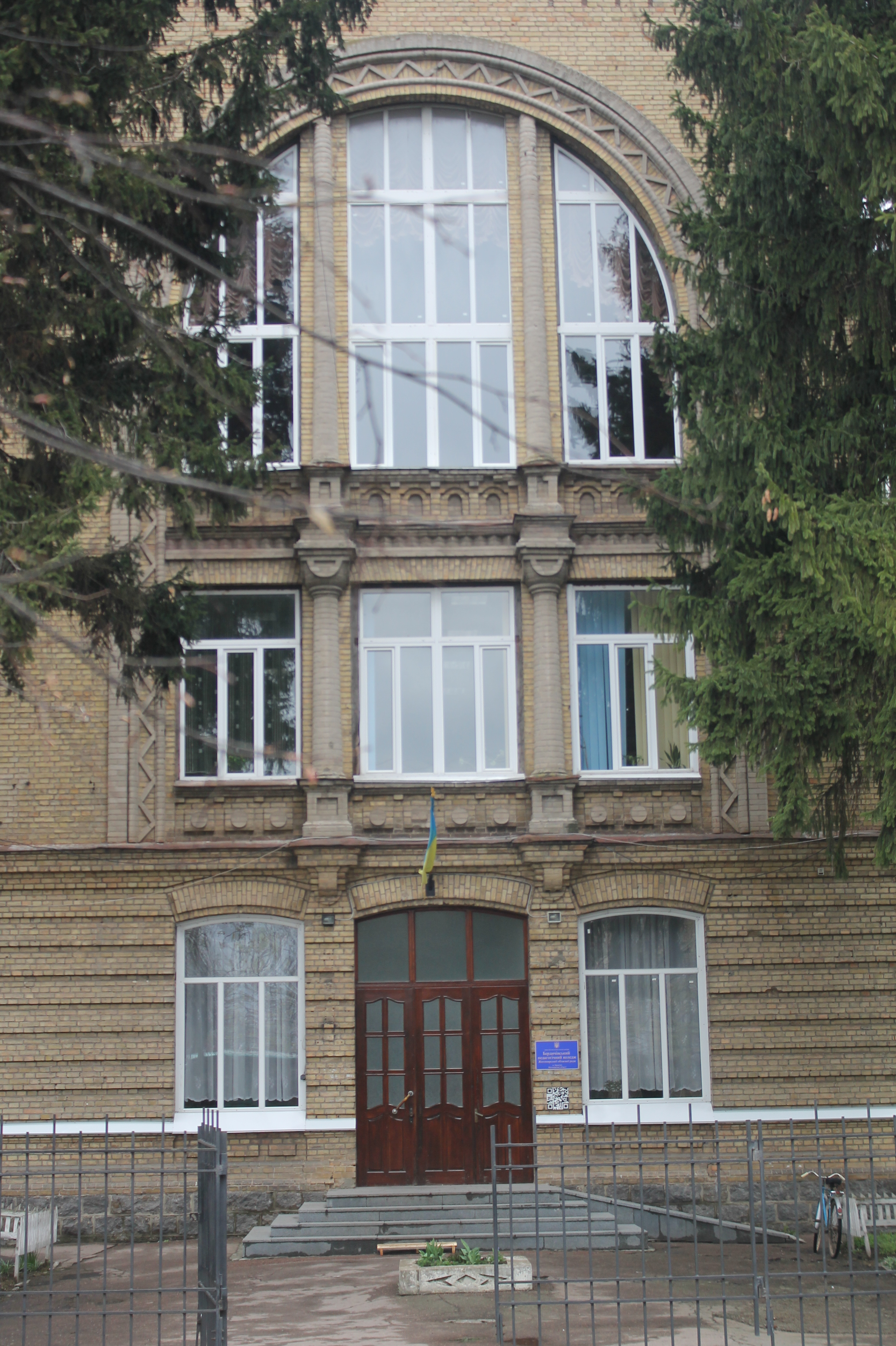 Бердичів. Педагогічний коледж, фасад